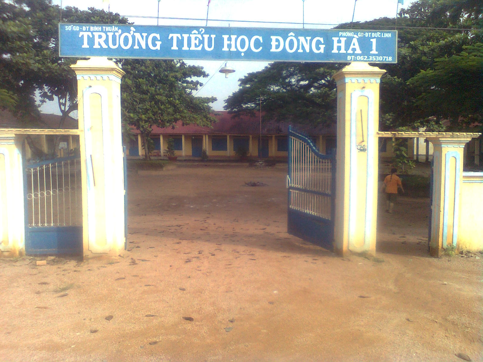 Trường tiểu học Đông Hà 1